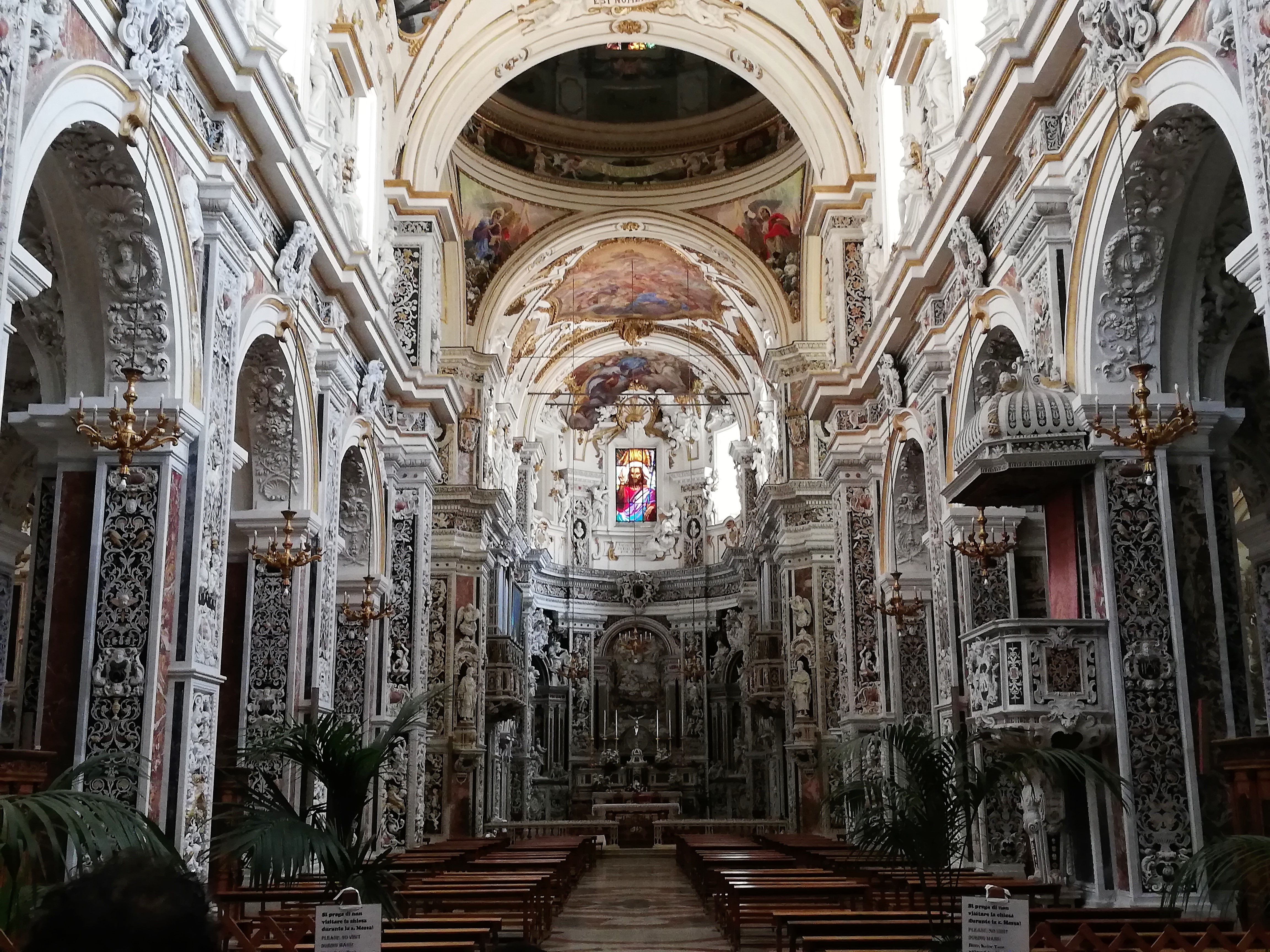 Navata.